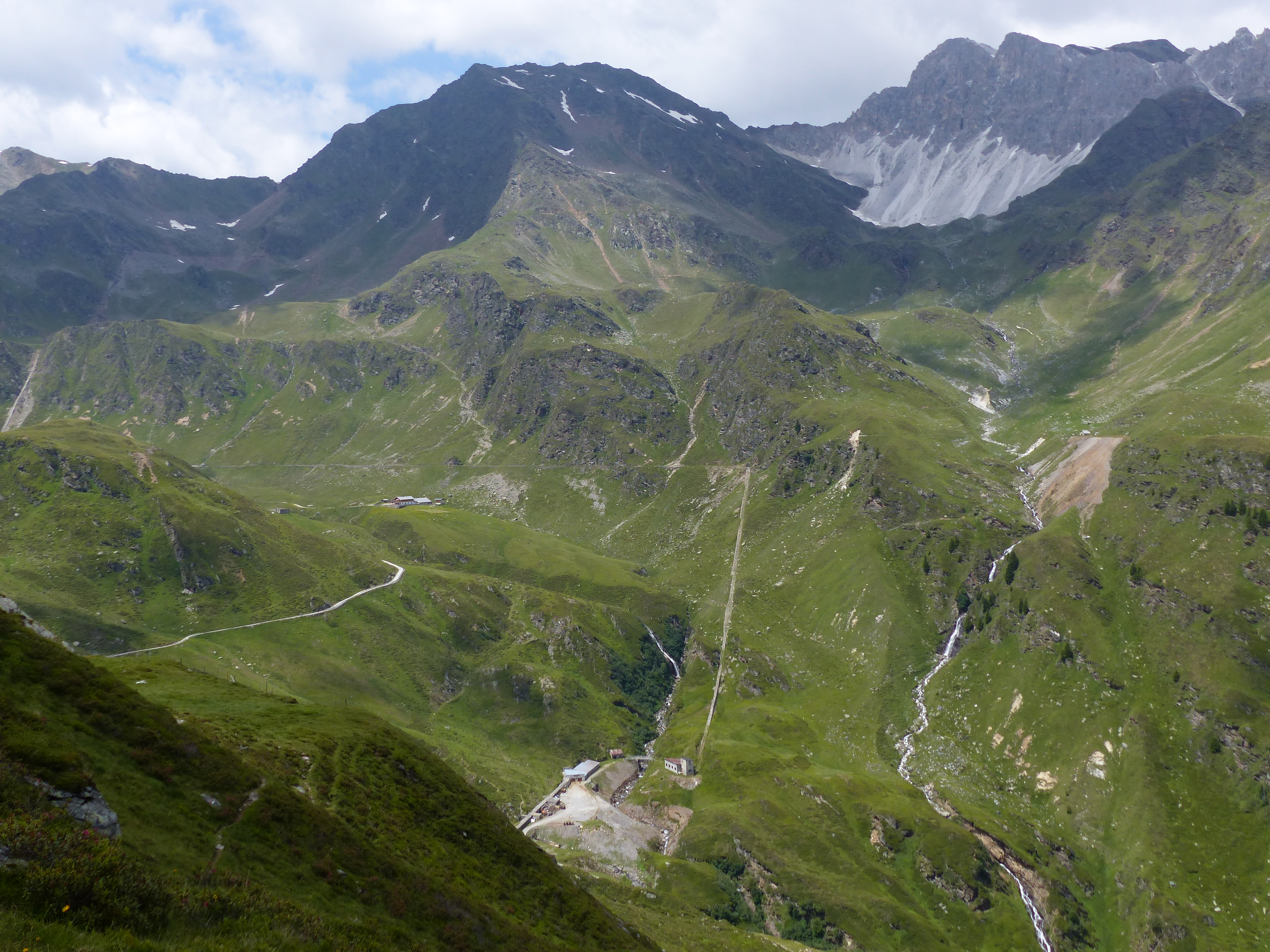 Oberes Lazzacher Tal mit den Resten der ehemaligen Erzförderanlagen. Rechts: Moarer Weißen.